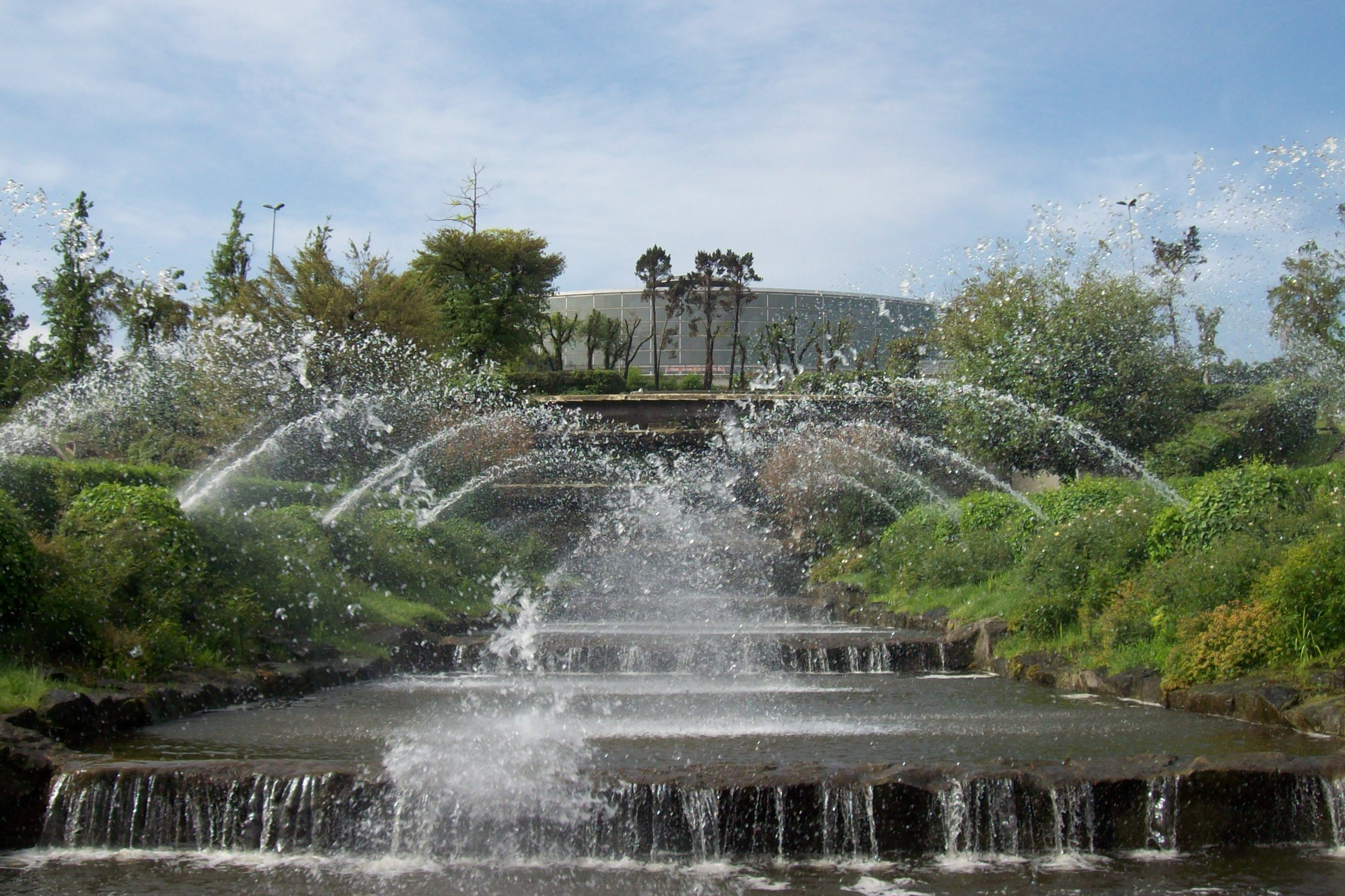 Vista della cascata del Laghetto dell'Eur; sullo sfondo il Palazzo dello Sport